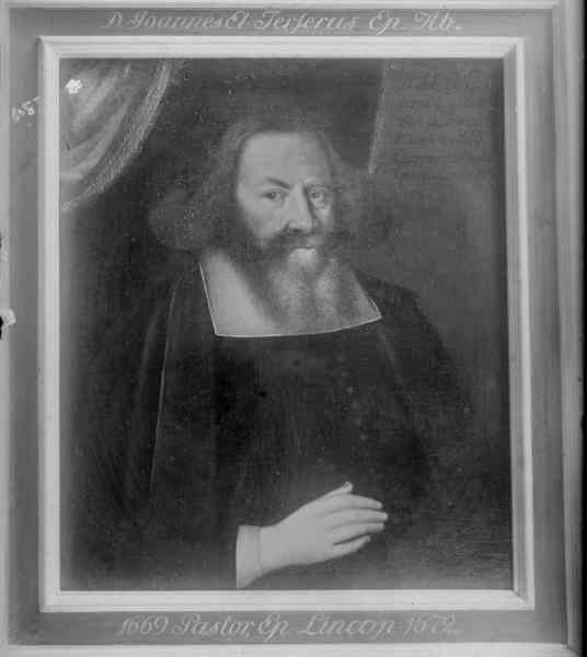 Porträtt föreställande J. Terserus, 1672. Kategori: (09) Porträtt Porträtt föreställande J. Terserus, 1672.